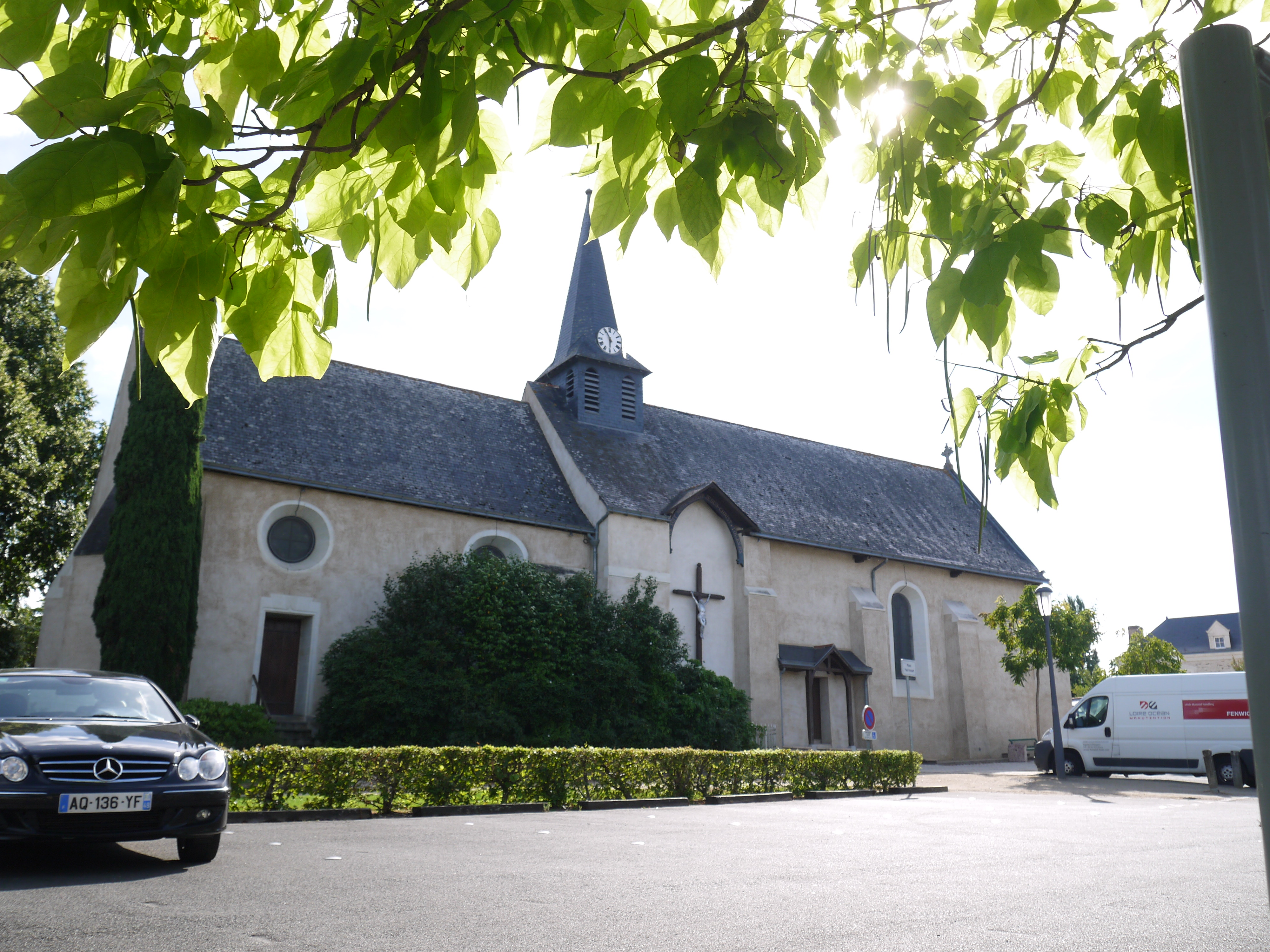 L'église Saint-Gilles.